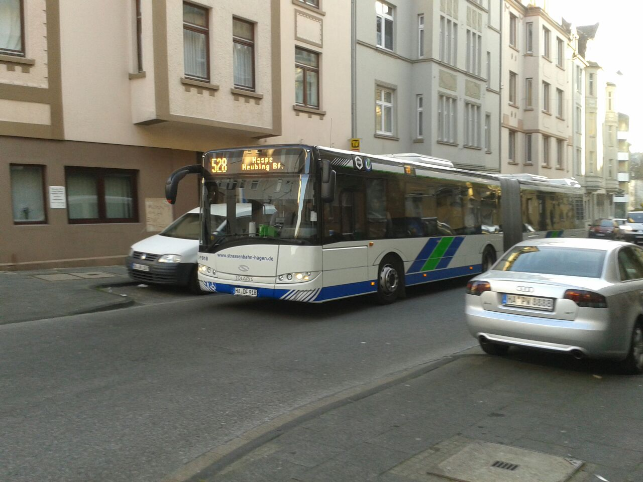 Ein Solaris Urbino Gelenkbus 918 der Hagener Straßenbahn auf der Linie 528 an der Haltestelle Franklinstraße in Wehringhausen. Planmäßige Abfahrt dieser Fahrt von der Haltestelle ist 07:29 Uhr.